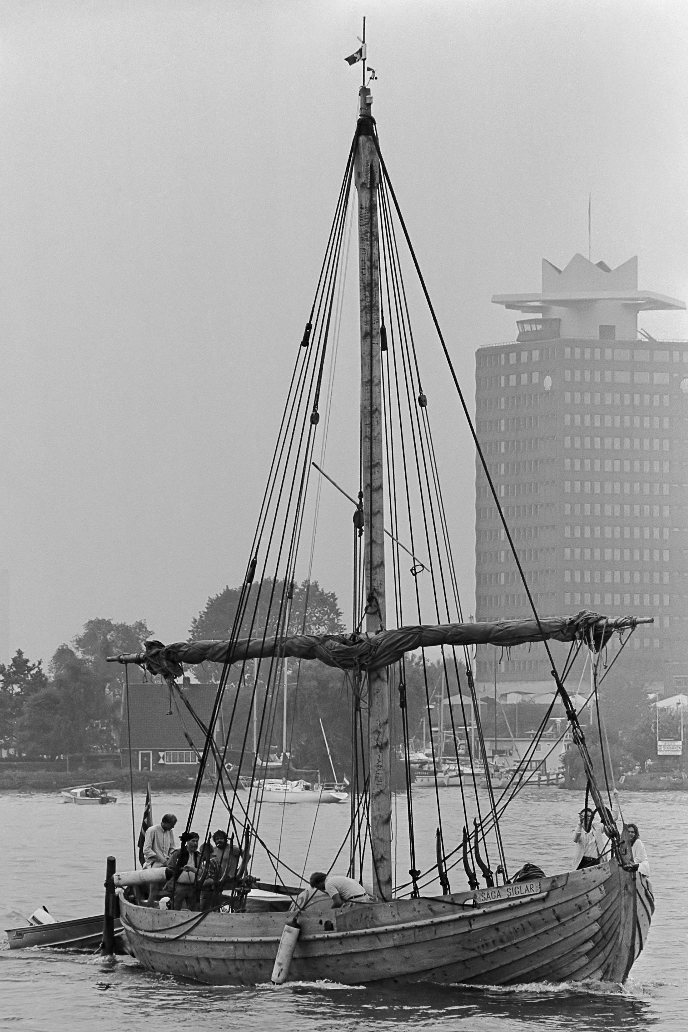 Aankomst van het vikingschip Saga Siglar in Amsterdam 24 juli 1983